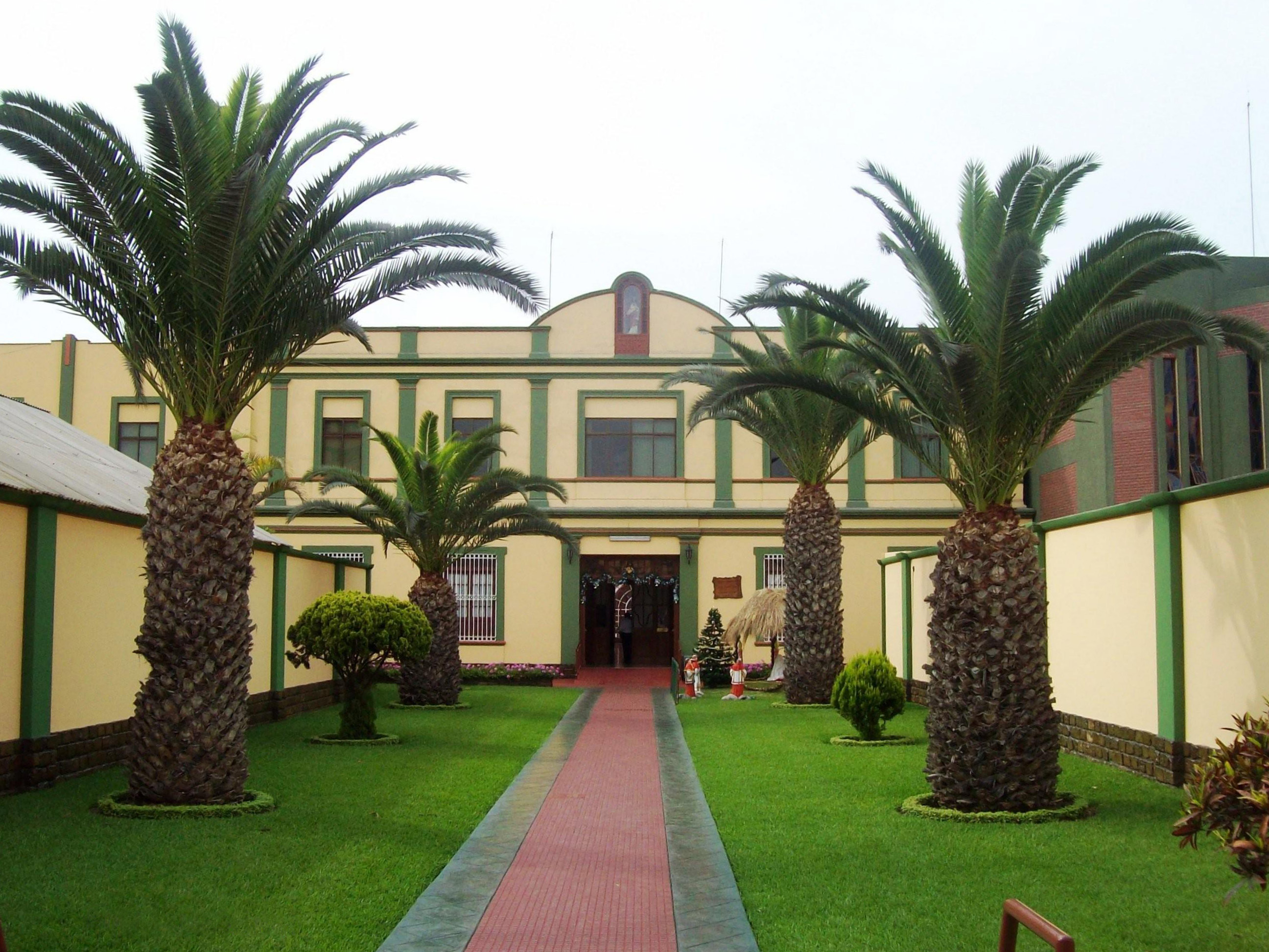 Asilo de las Hermanitas de los Ancianos Desamparados.